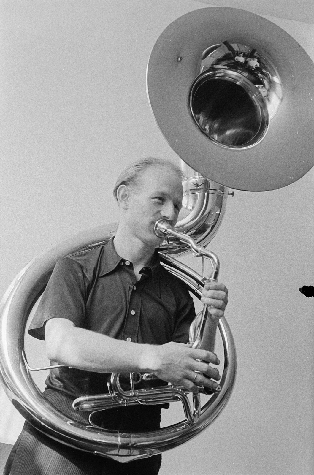 Original image description from the Deutsche Fotothek Ein Mann spielt ein Sousaphon auf der Leipziger Herbstmesse 1954